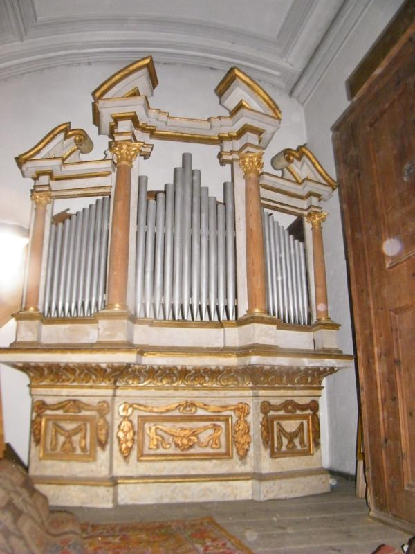 B-Gaden Orgel St. Andrä